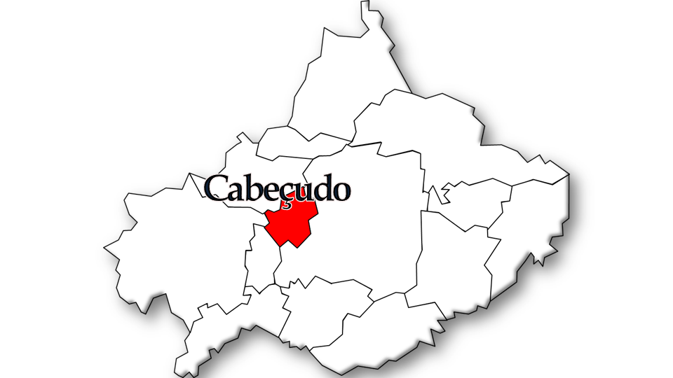 População